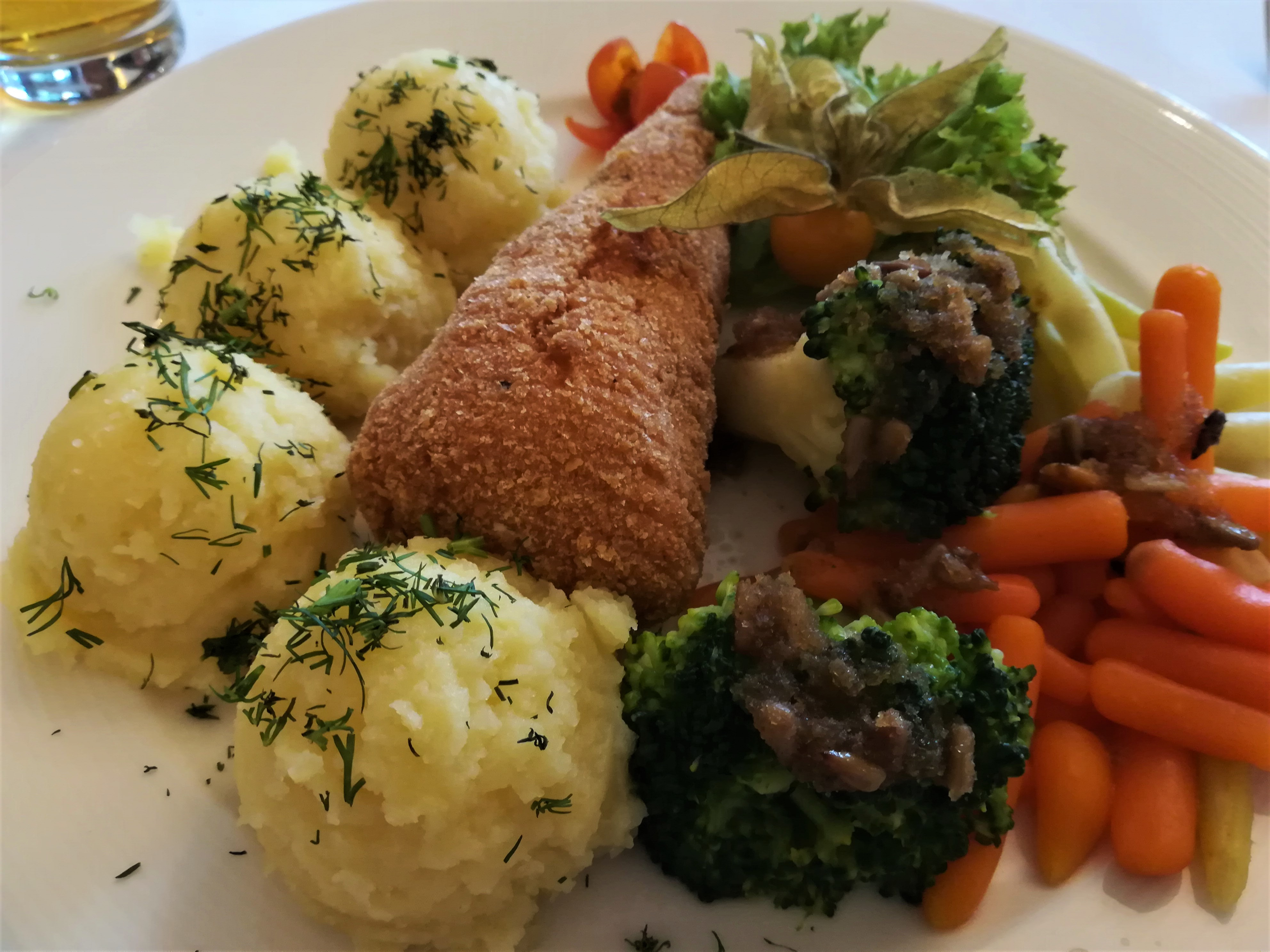 Kotlet de volaille w Polsce.